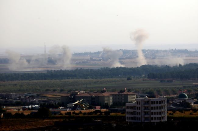 Barış Pınarı Hârekatı sonrası Resulayn (Serêkanî) bombalanıyor